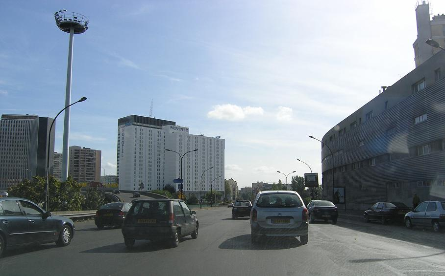 L'échangeur, périphérique, porte de bagnolet 2004 Je suis l'auteur de cette photo.